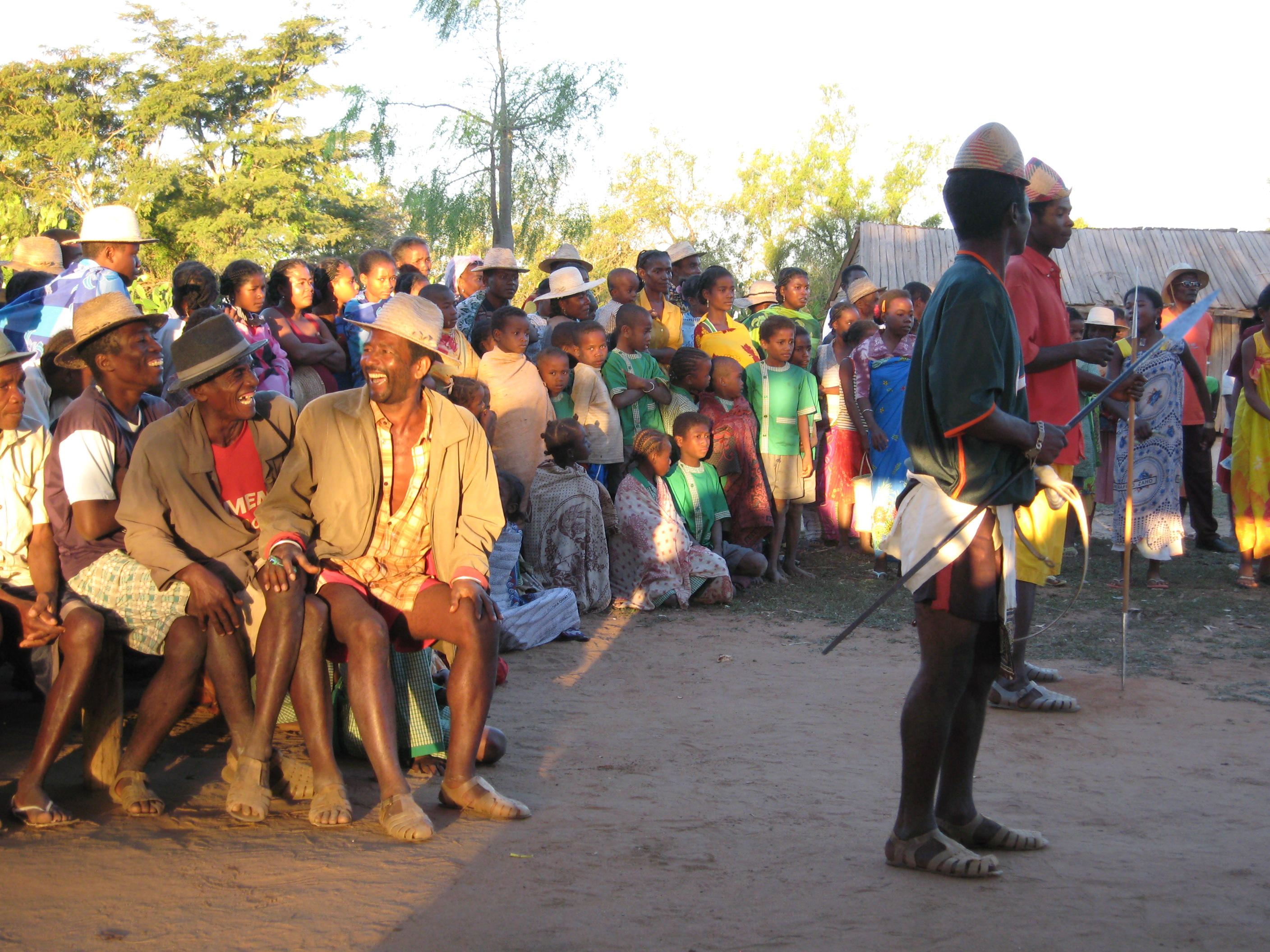 Antandroy traditional dancing